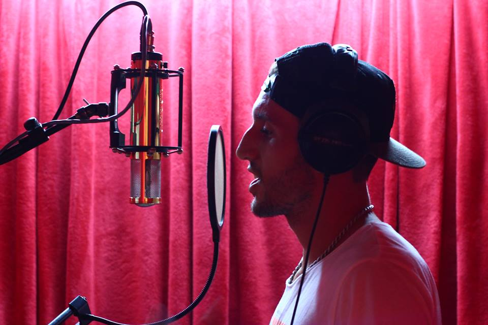 Vasko Mladenov´música